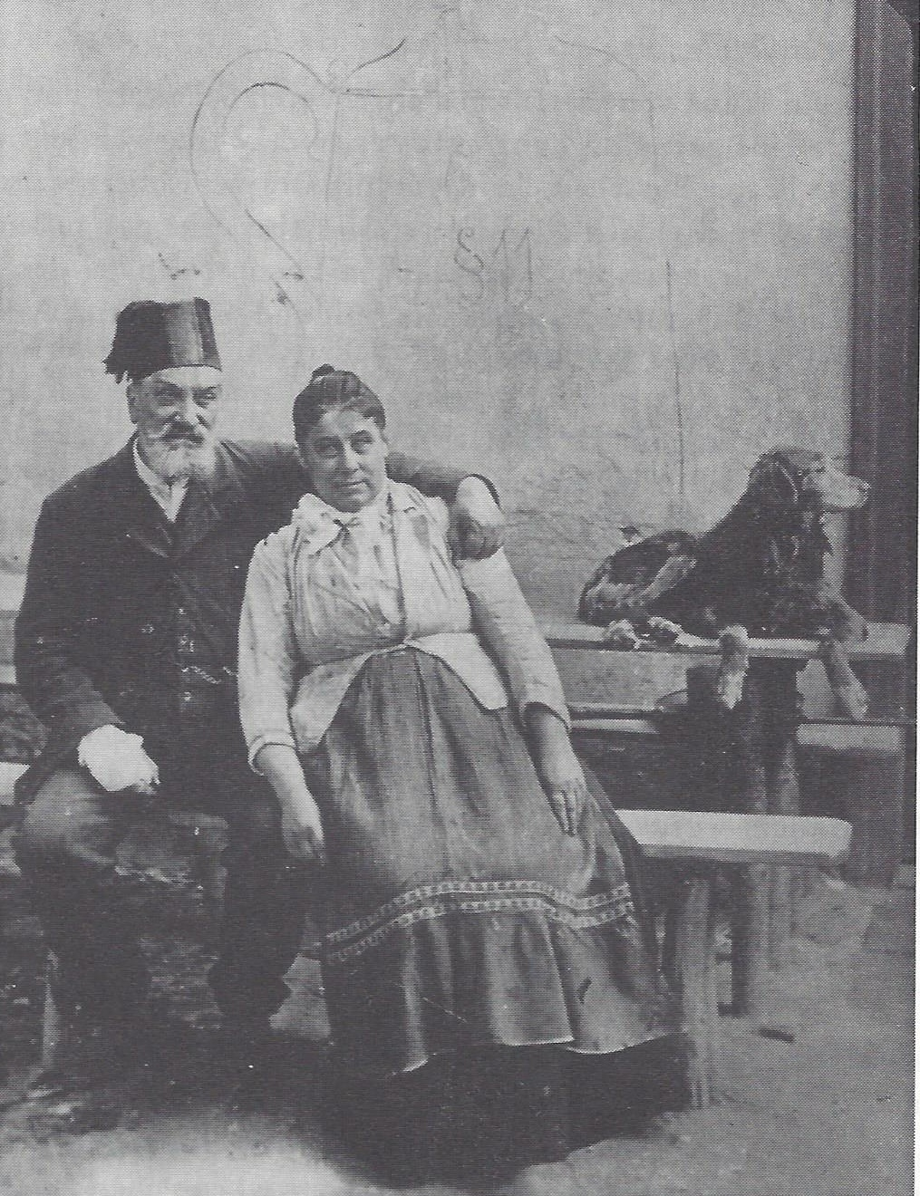 Moritz Milde († 1910) und seine Ehefrau Anna Milde († 1924) in ihrem Wirtshaus Schipkapaß in Alt Dejwitz bei Prag